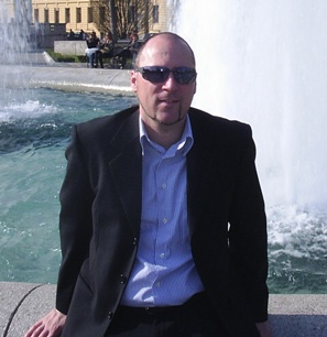 Leo Pavela prije promocije